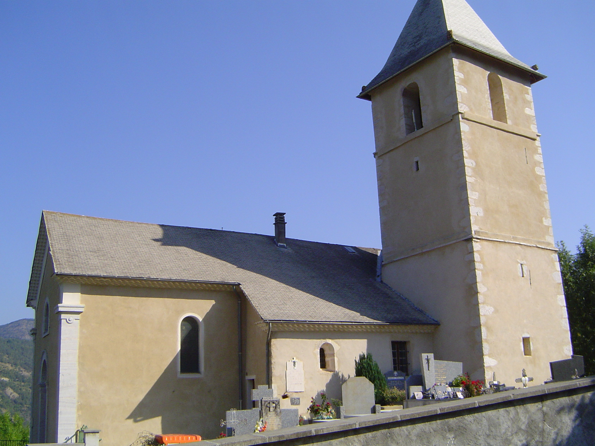 Photo prise à Saint-Étienne-le-Laus